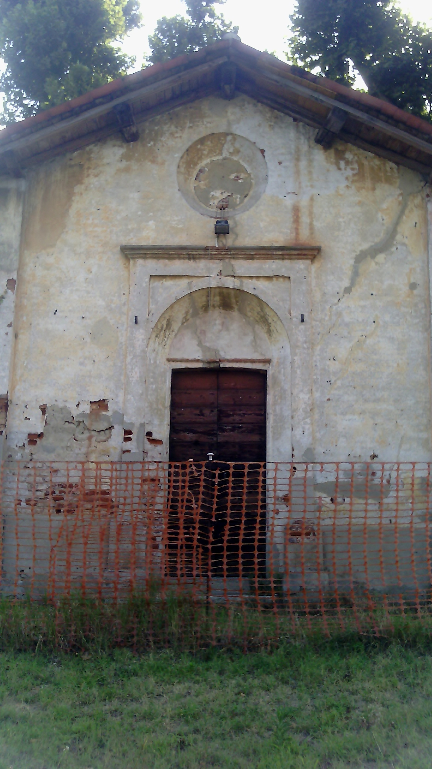 La facciata dell'oratorio di San Rocco a Fallavecchia, Morimondo (MI)